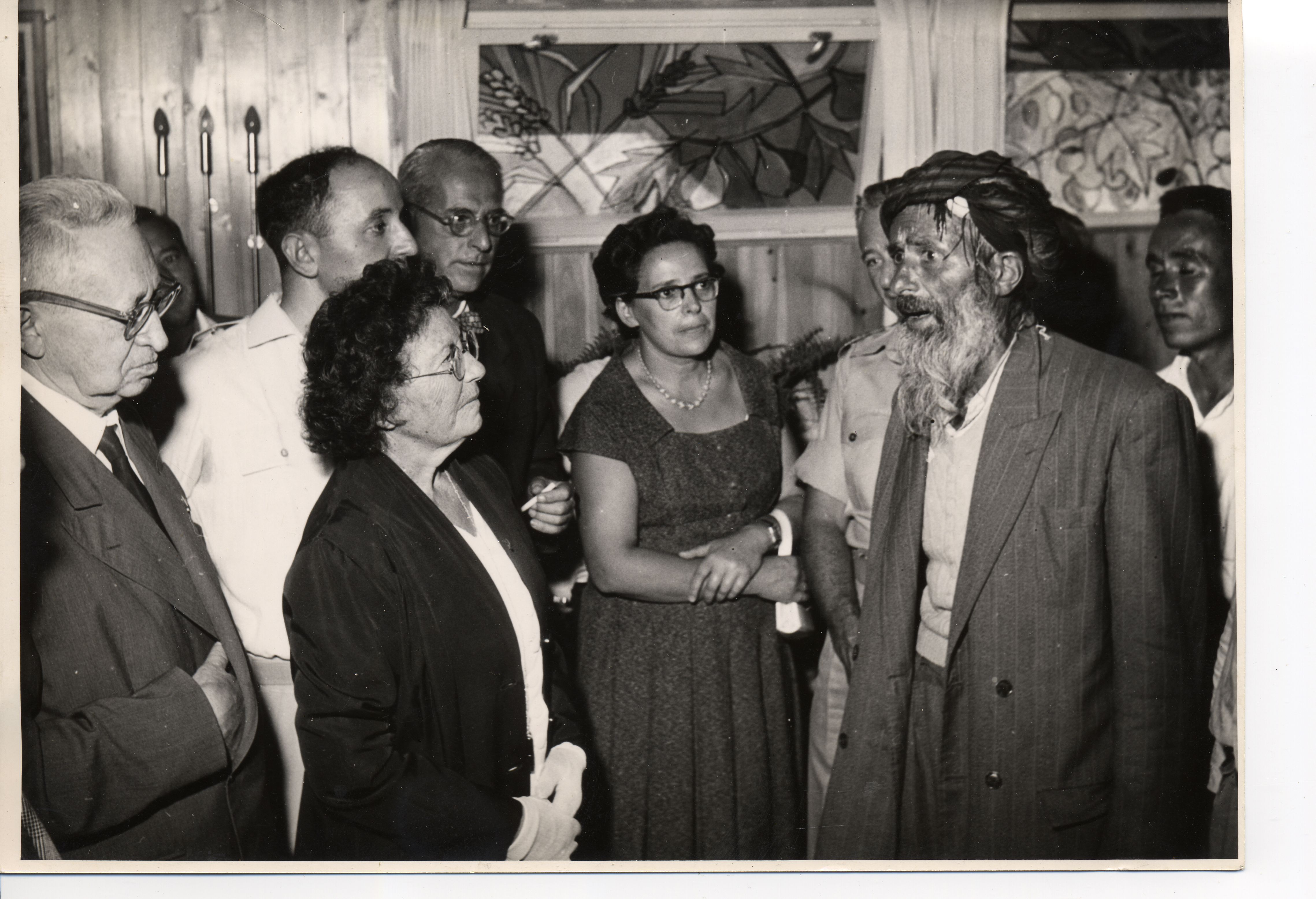 נשיא המדינה השני של מדינת ישראל, יצחק בן-צבי, הנהיג מסורת של פתיחת שערי המשכן לאזרחי ישראל בחג הסוכות. הבית הפתוח אירח בסוכתם (למעשה בצריף קבלת האורחים הנשיאותי) אזרחים ועולים חדשים. לימים הפך הבית הפתוח למסורת. באדיבות יד בן-צבי.